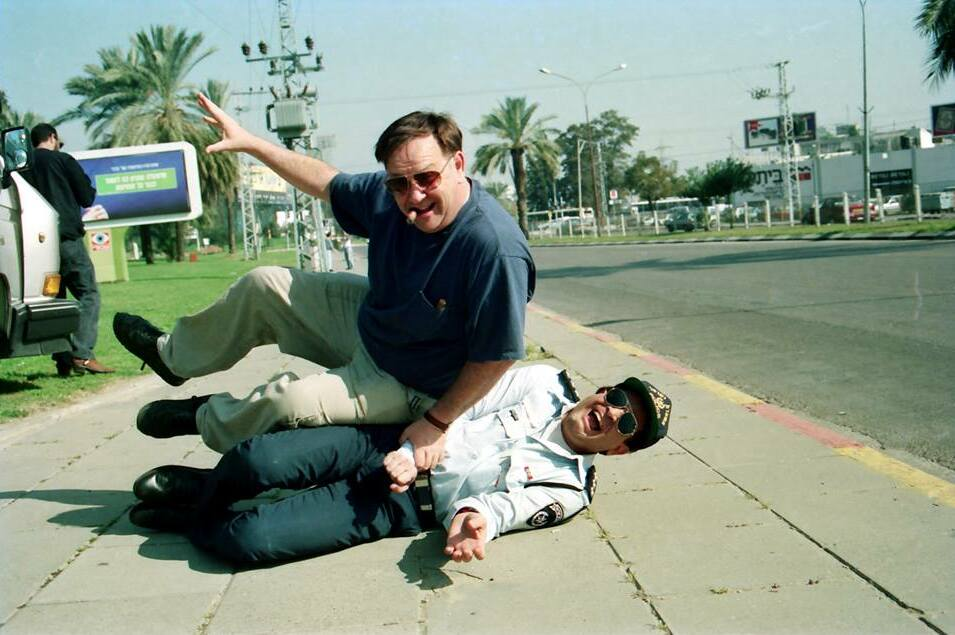 אלי יצפאן ויגאל שילון מתוך פיספסים